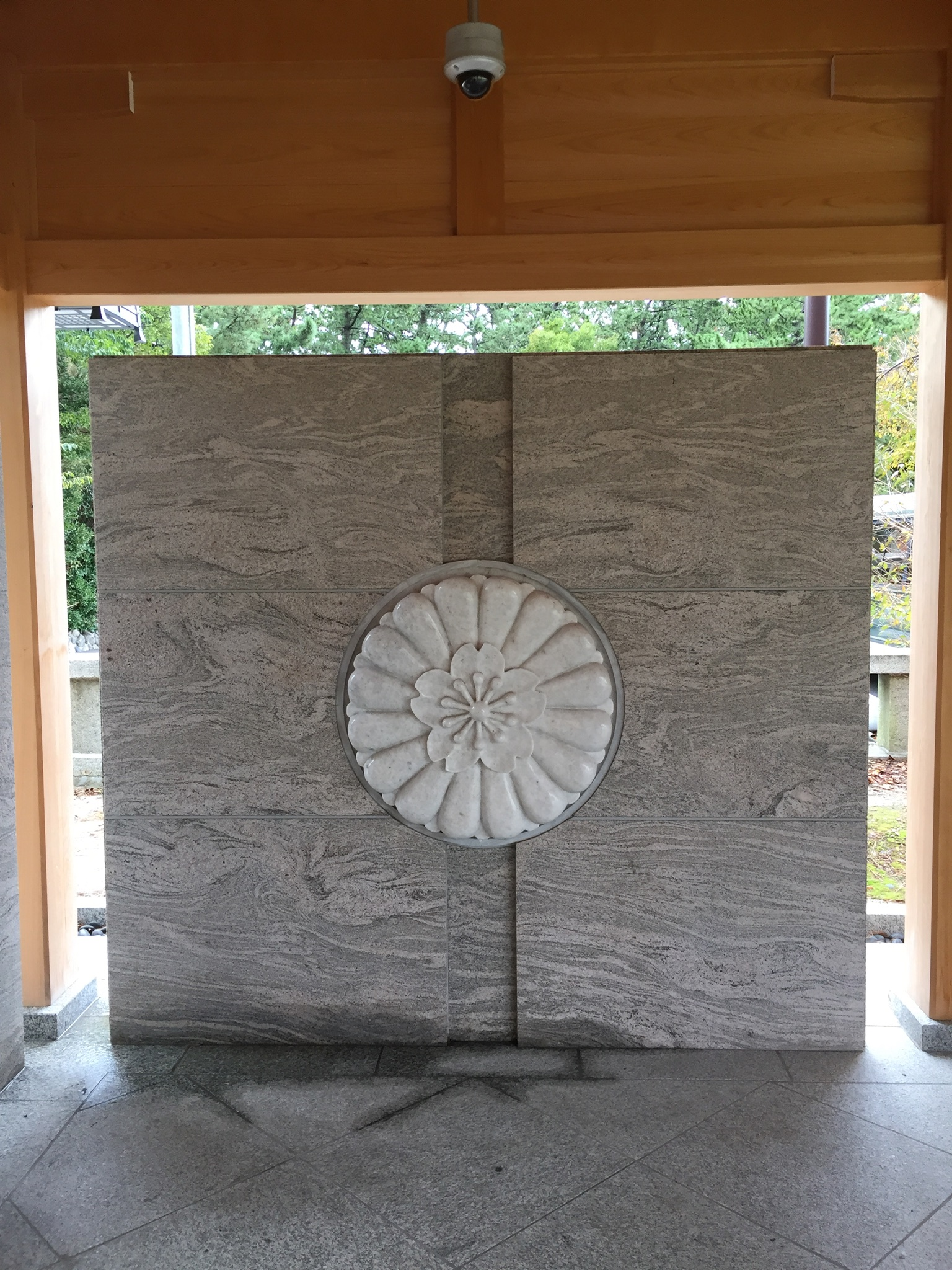 太平洋戦争の戦時中に旧日本軍がビルマ独立義勇軍と同調し、旧ビルマ国（現ミャンマー）のイギリスの植民地からの解放に大きく貢献した。それとともに太平洋戦争における新潟県出身者の戦病死者数が5,563名となったことからその偉業により、ミャンマーより自国産の白大理石が寄贈され2018年の創祀150年の記念に建造された。